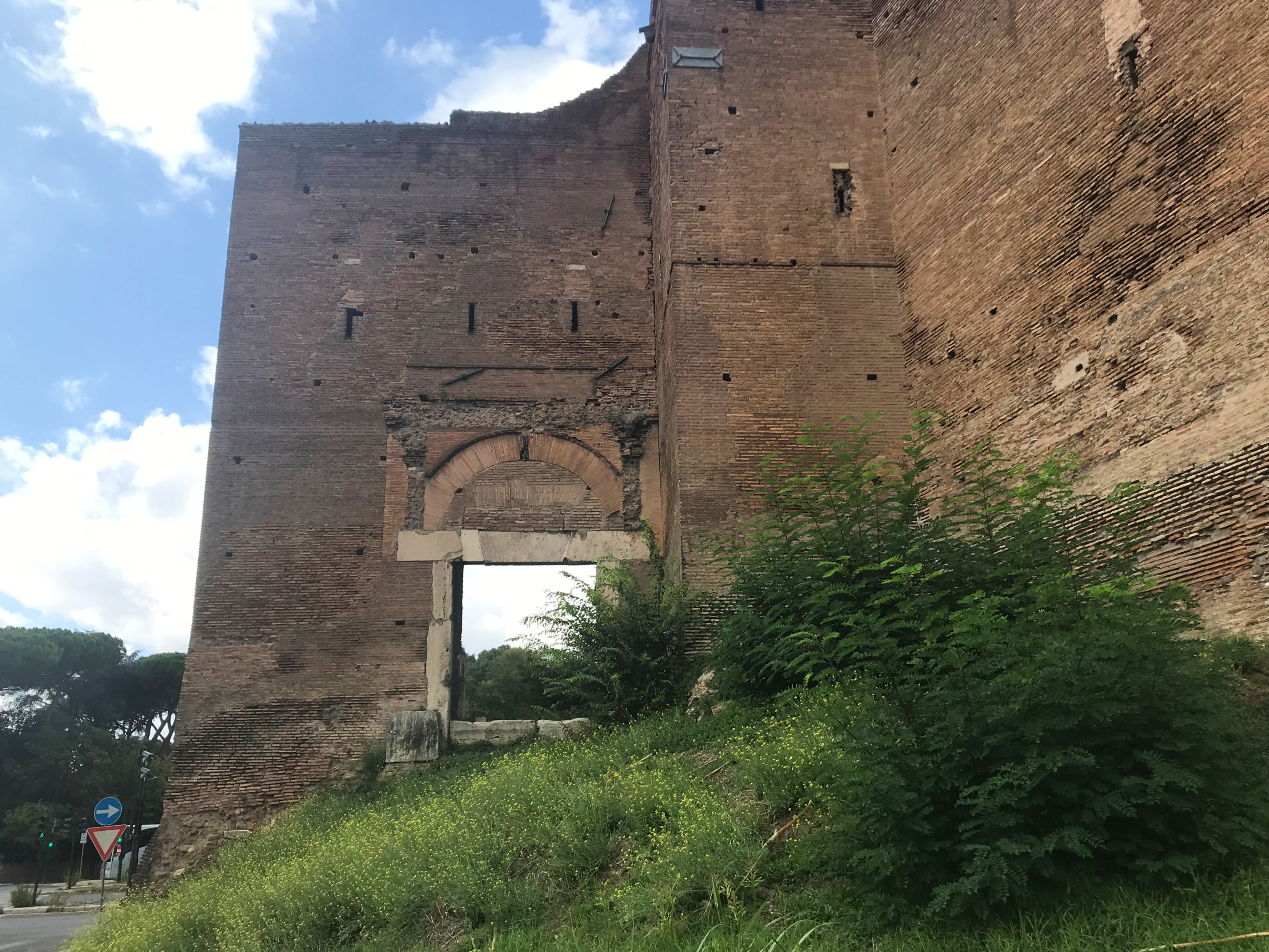 Porta Ardeatina a Roma